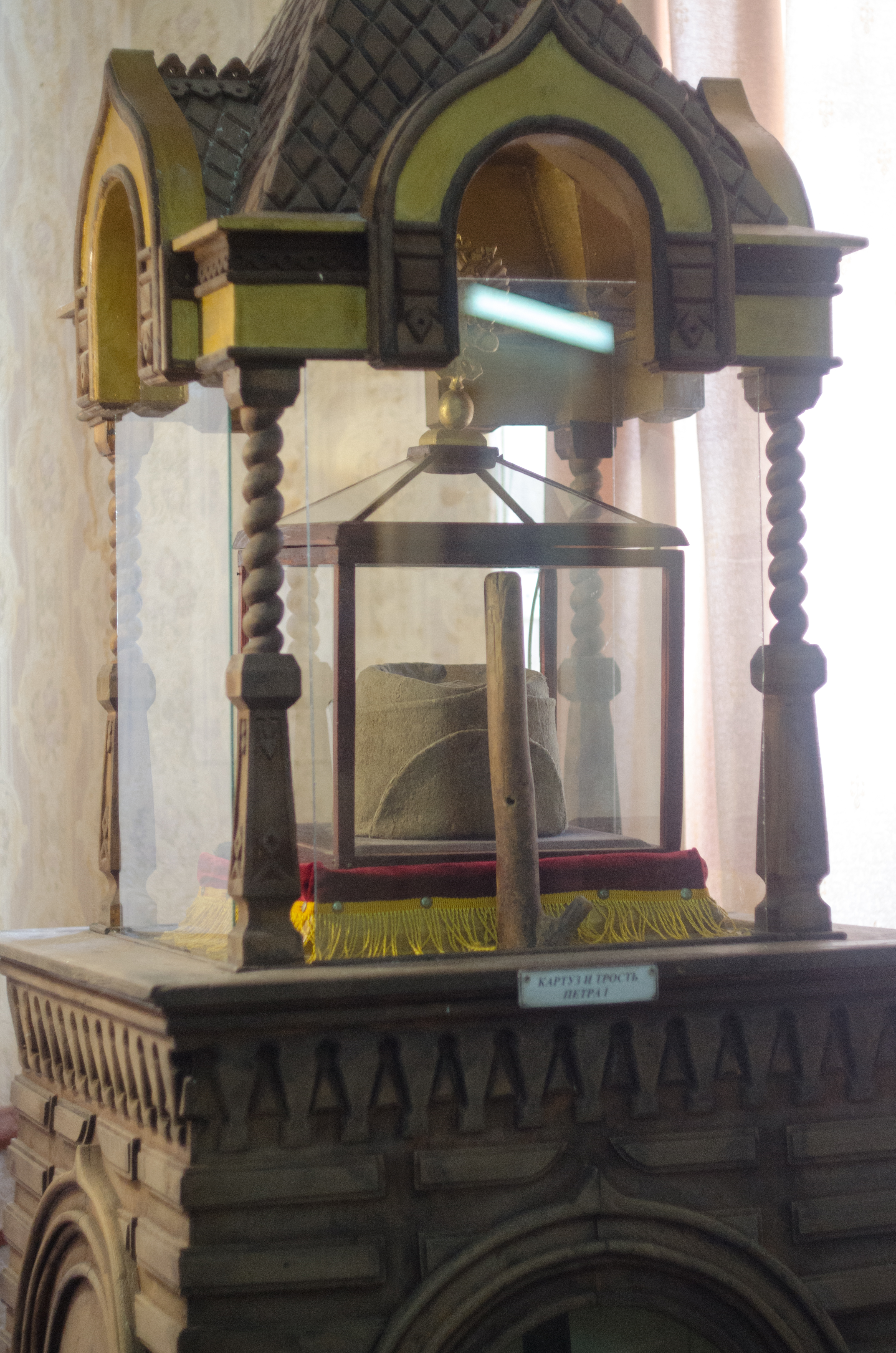 Картуз и трость Петра I в Волгоградском областном краеведческом музее